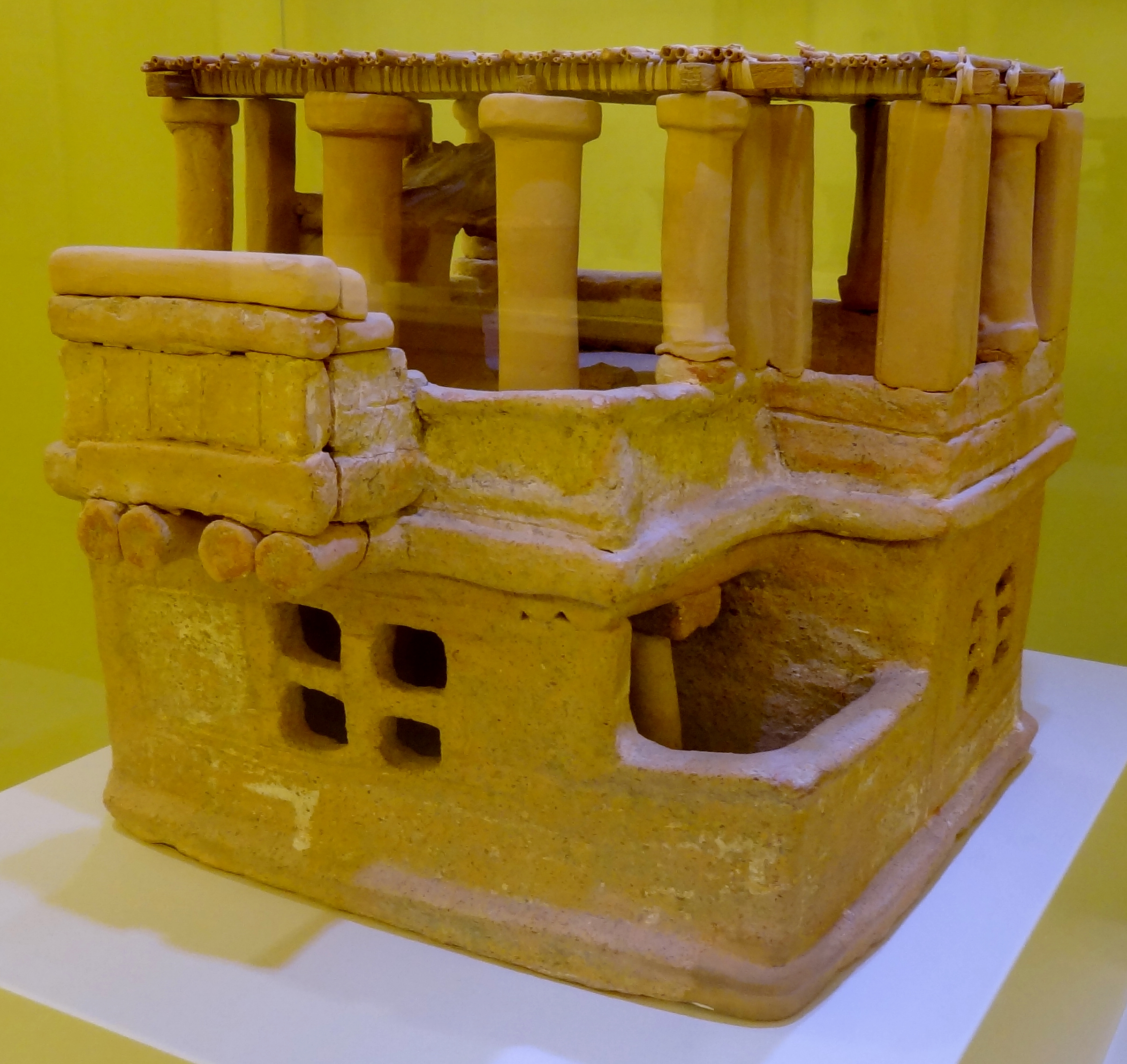 Tonmodell eines minoischen Hauses (Neupalastzeit, um 1600 v. Chr.) aus Archanes, ausgestellt im Archäologischen Museum Iraklio, Kreta, Griechenland